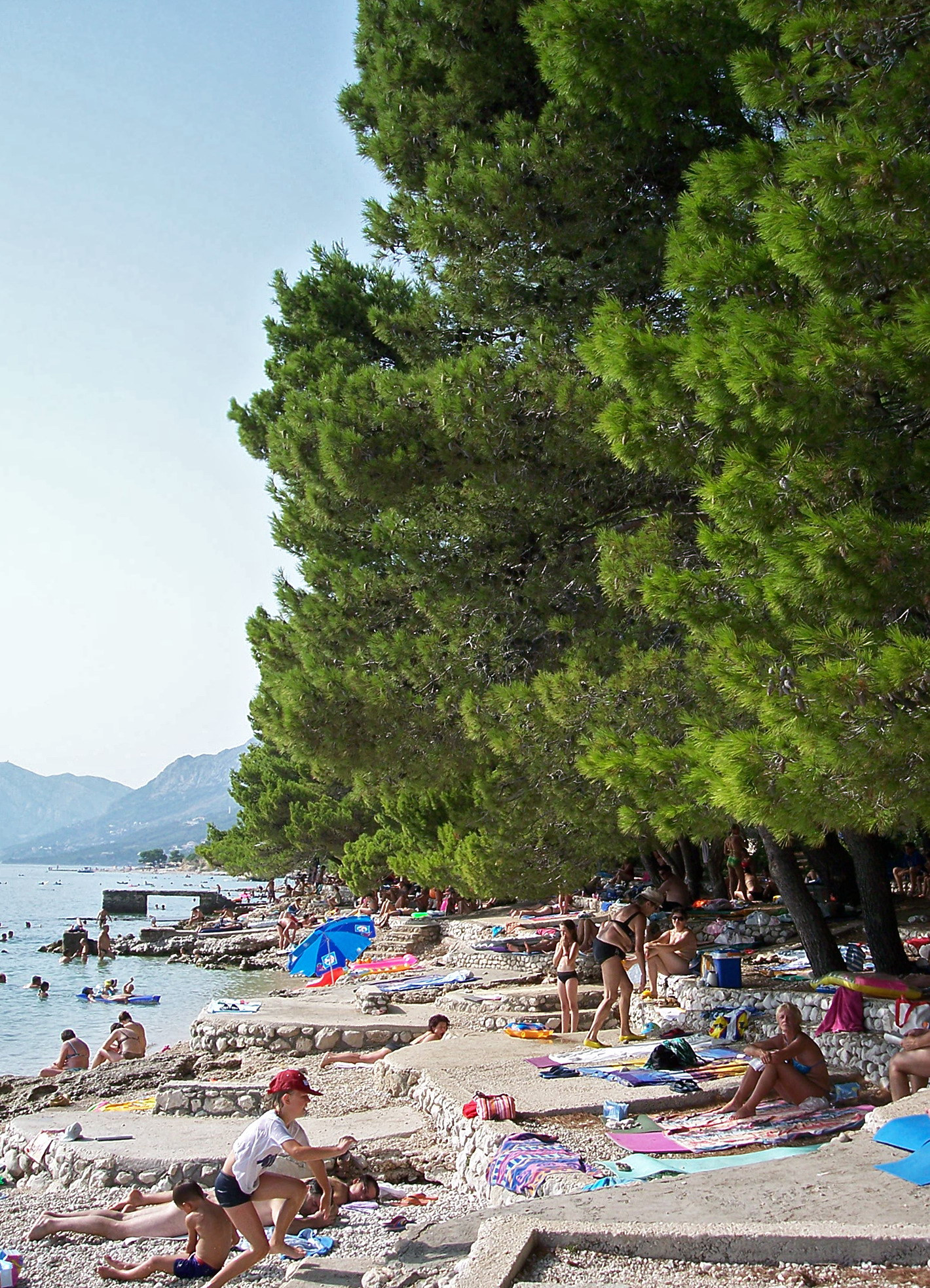 Beach in Baška Voda (Croatia)